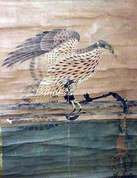 浅利政吉（牛蘭）鷹架図